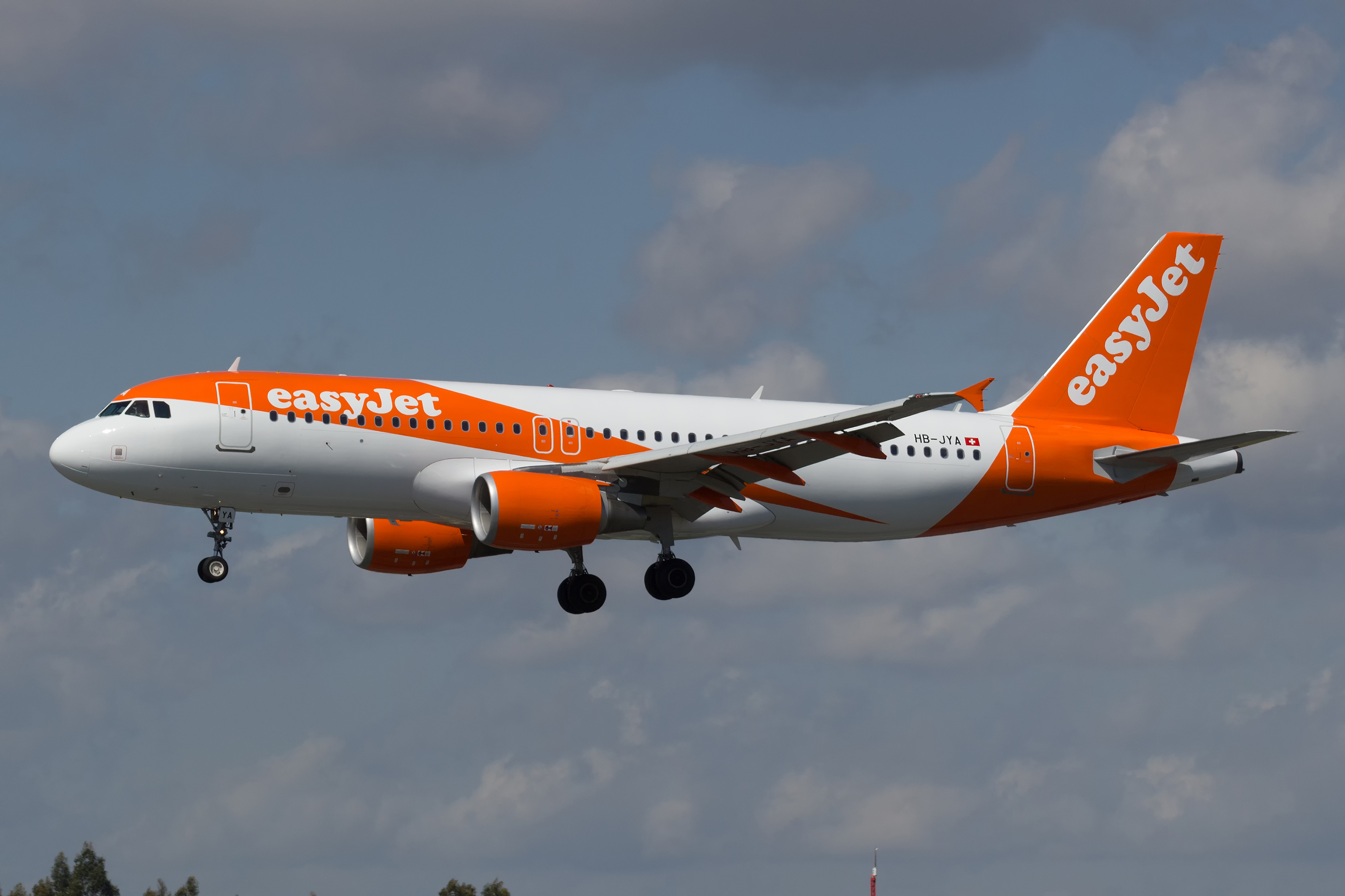 Airbus A320 de easyJet Switzerland aterrando no aeroporto de Santiago de Compostela.